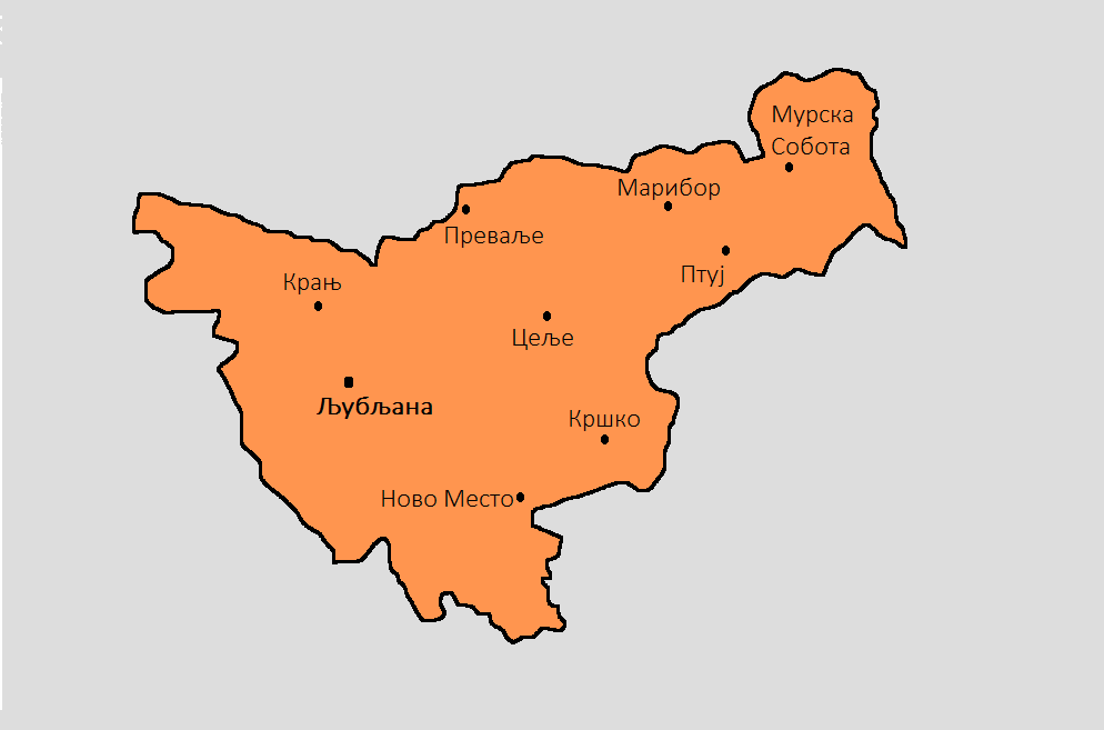 Мапа на Дравската Бановина со позначајните места, вклучувајќи и главниот град, Љубљана